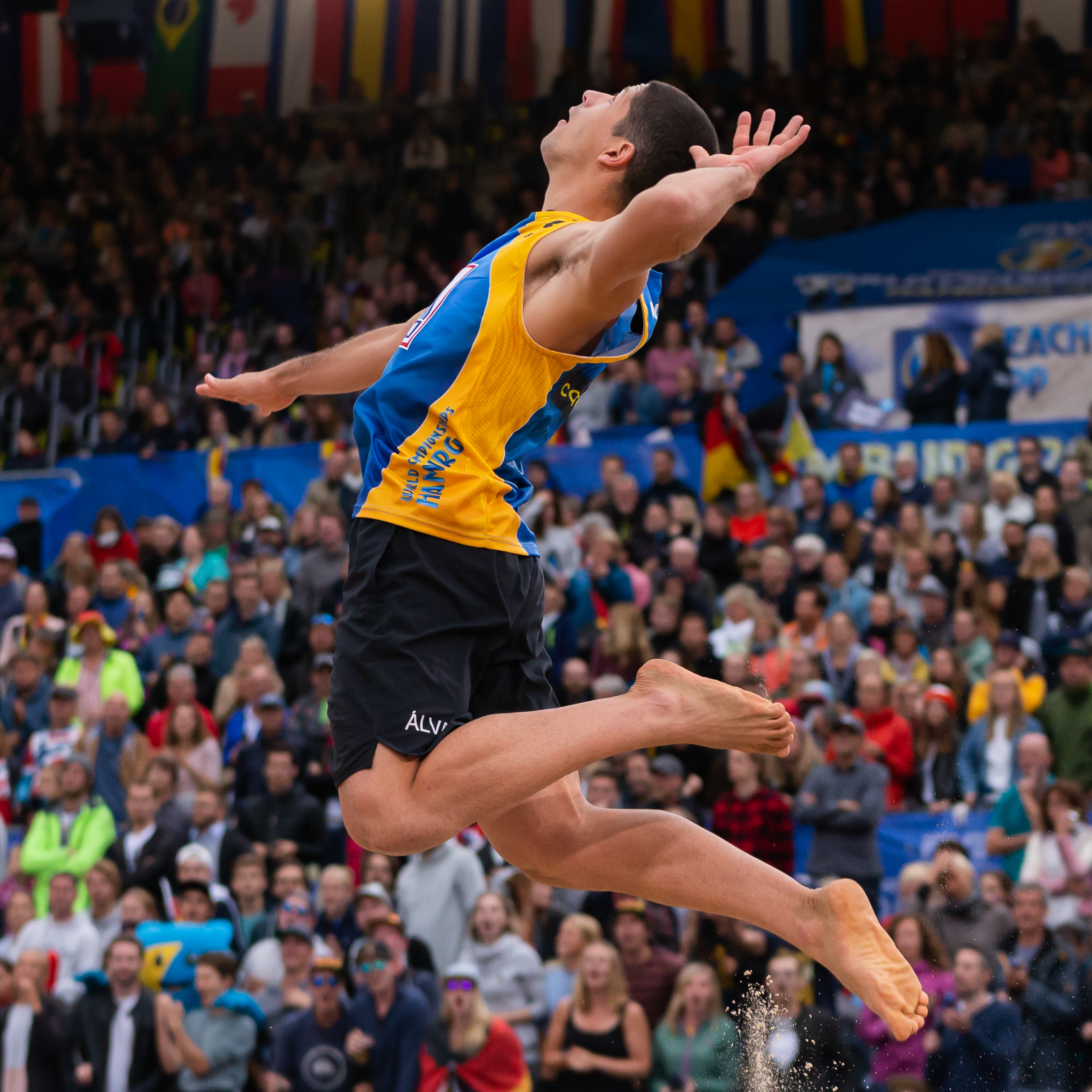 BeachVolleyball Weltmeisterschaft Hamburg 2019; Alvaro Magliano de Morais Filho (BRA, Brasilien)